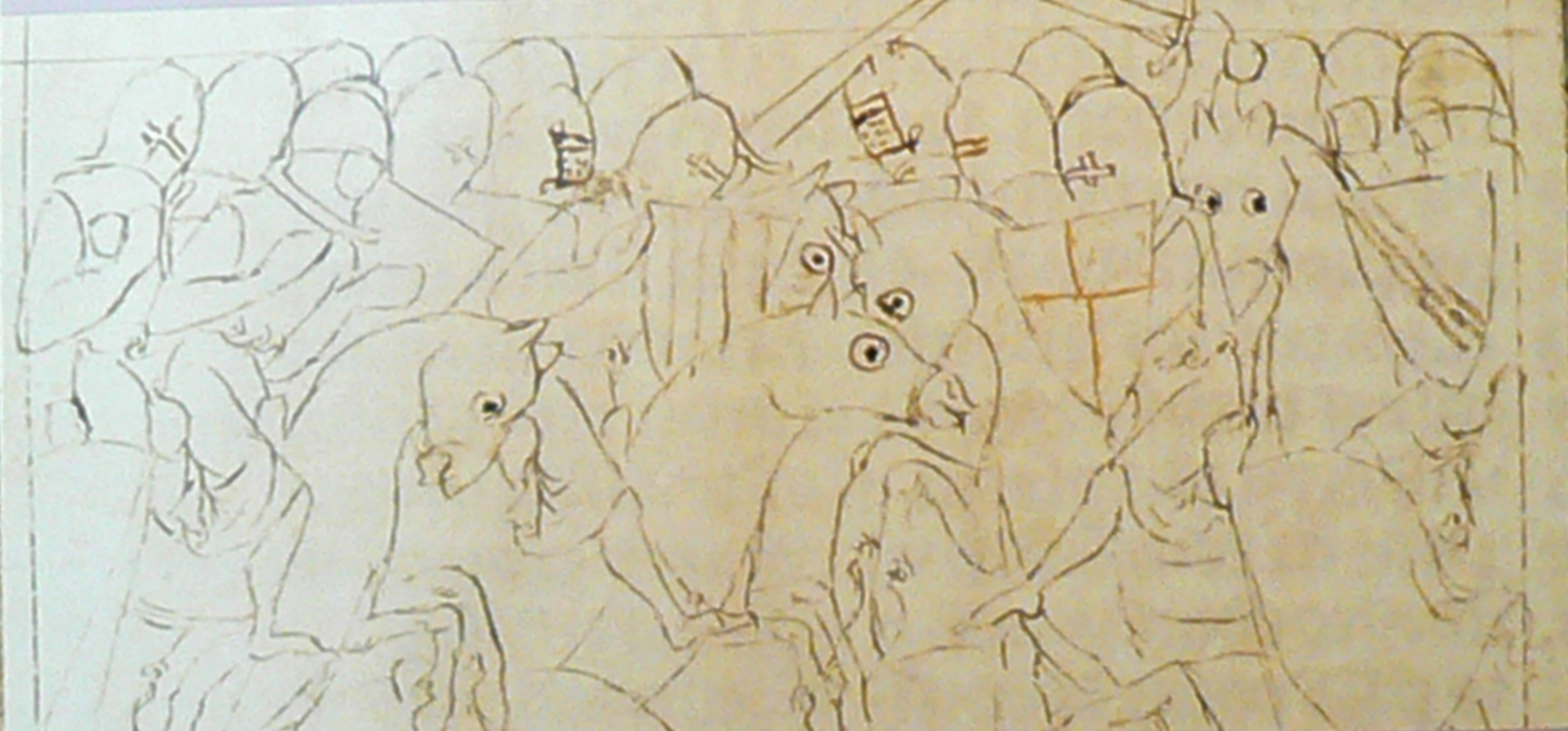 boje u Baziège roku 1219. z Chanson de la croisade des Albigeois od Guilhema de Tudèle.